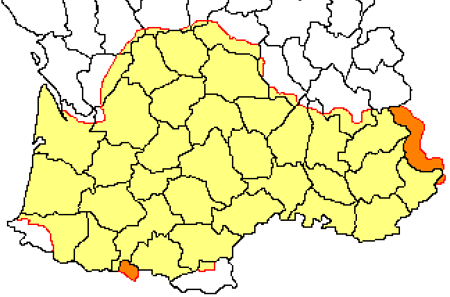 Occitània granda dins Occitània